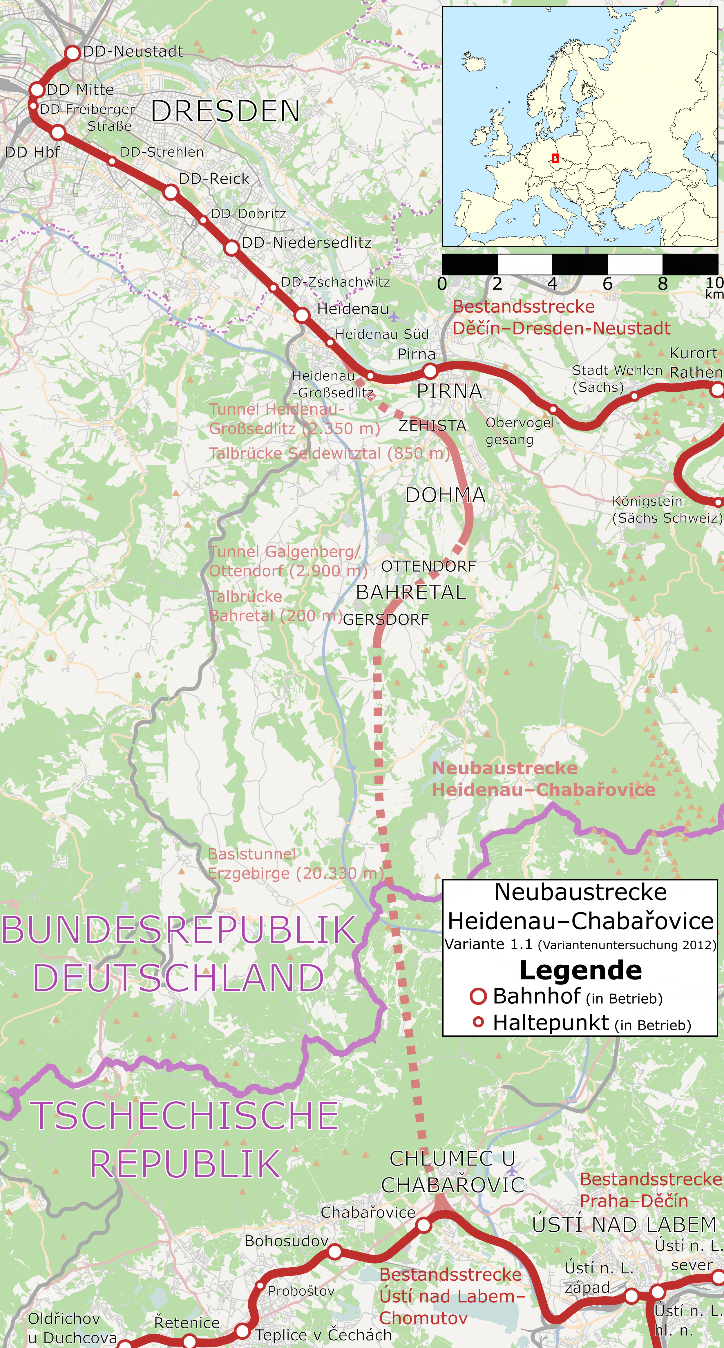 Neubaustrecke Heidenau–Chabařovice, dargestellt ist Variante 1.1 gemäß Variantenuntersuchung 2012, weitere Informationen auch in der deutschen Wikipedia